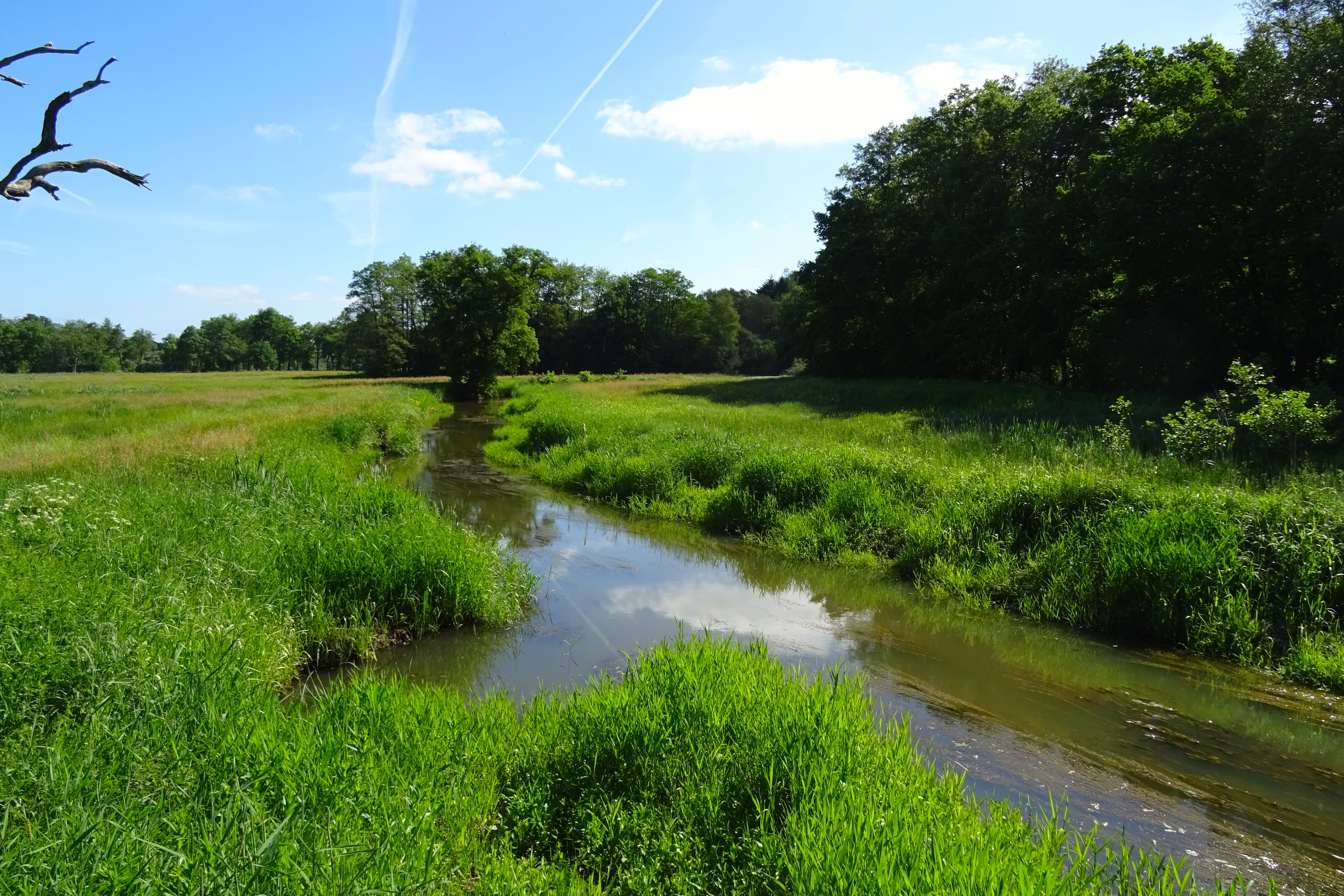 Oudemolensche Diep in het Nationaal Park De Drentsche Aa ten zuiden van Oudemolen